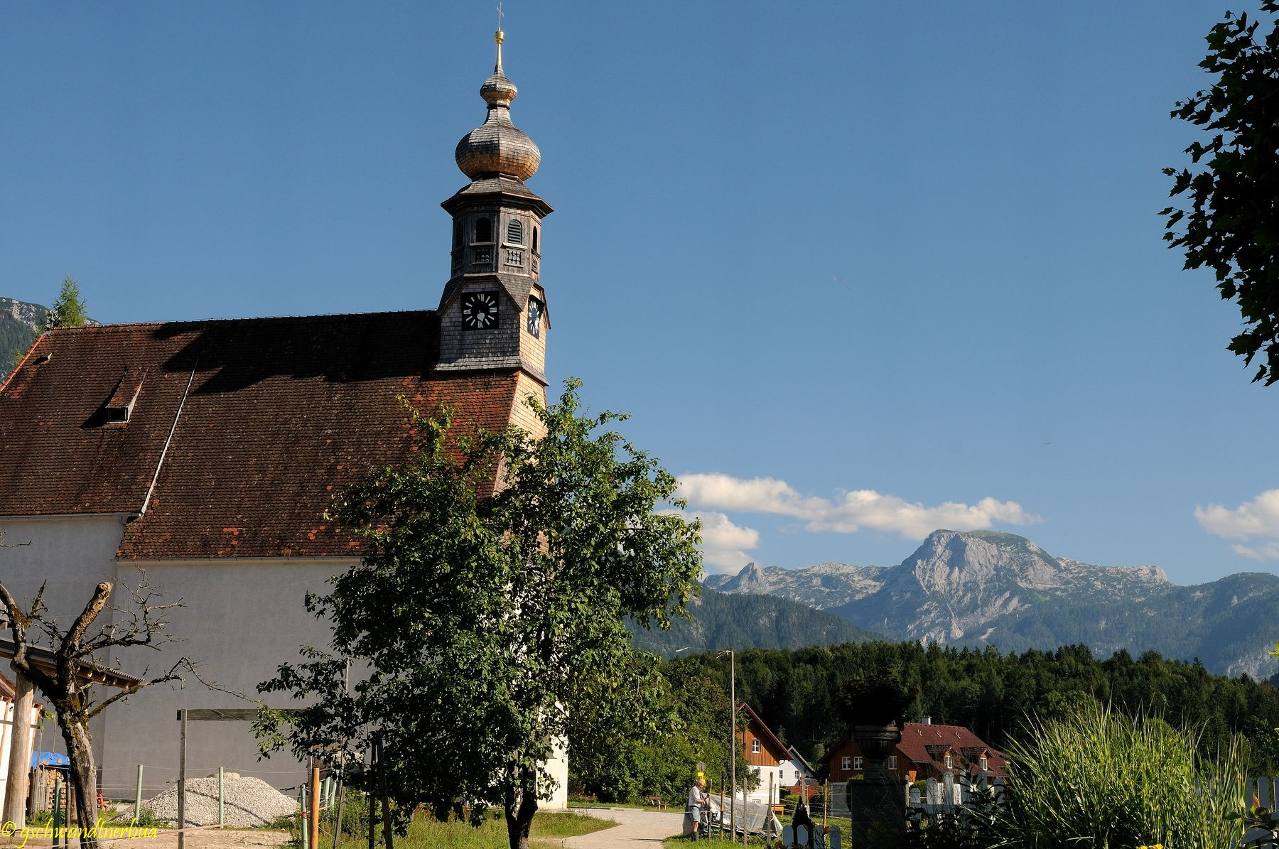 Kirche St. Agatha - Bad Goisern / Im Hintergrund der Krippenstein